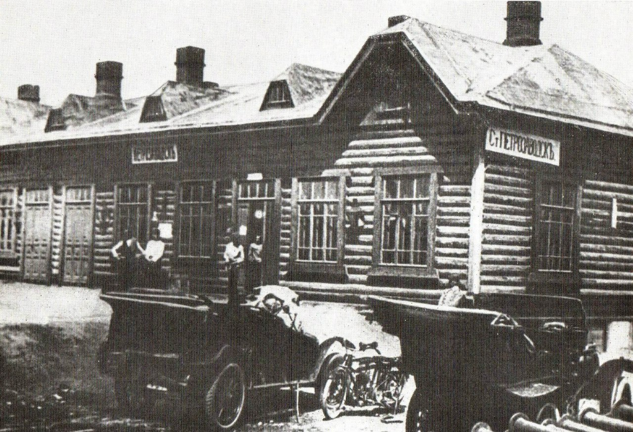 Вокзал станции Петрозаводск в 1916 г.